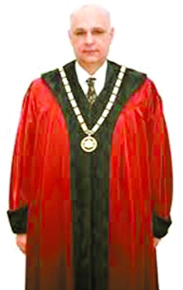 Красен Стойчев